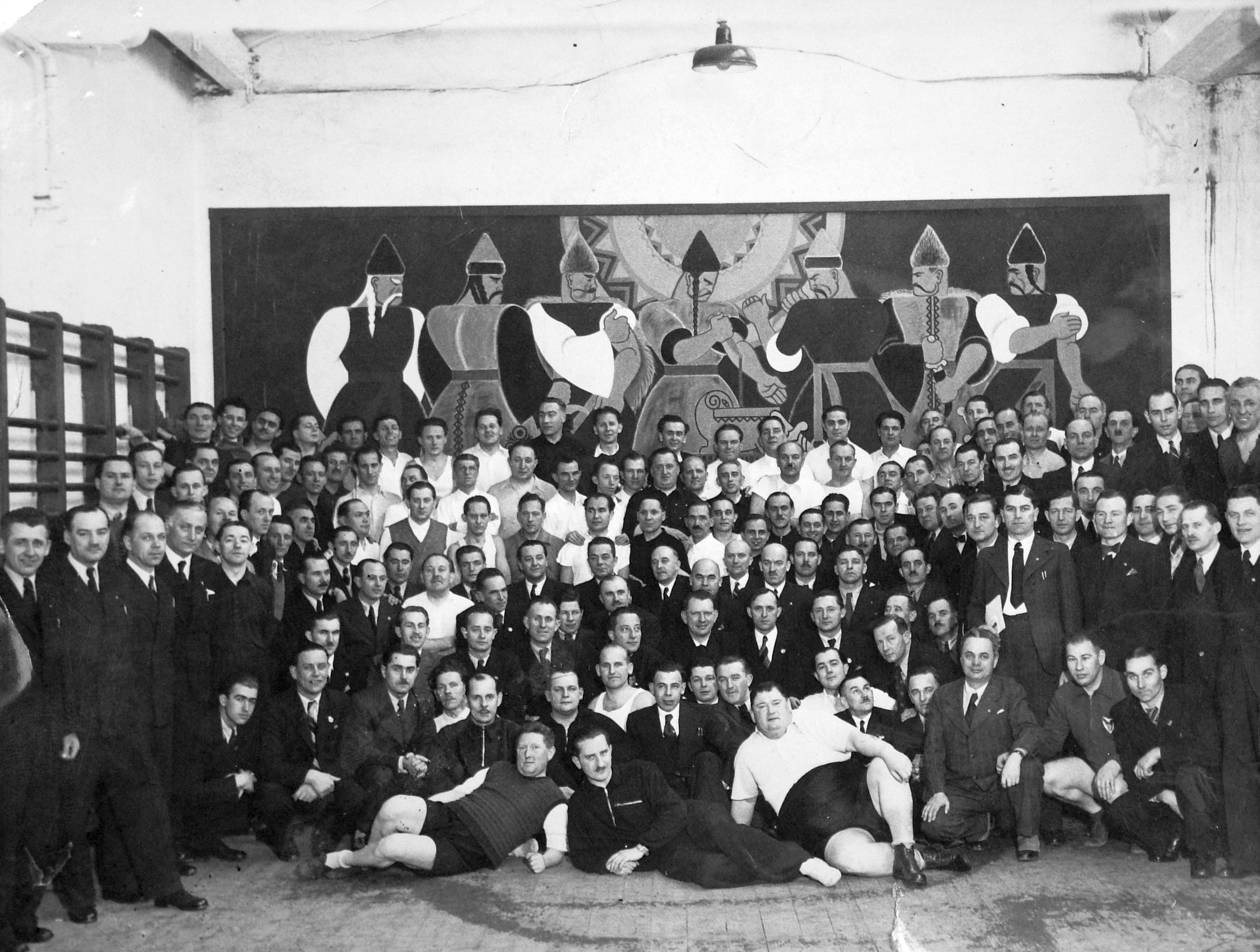 A háttérben Fáy Aladár festőművész (1898-1963) Vérszerződés című műve. Title: A háttérben Fáy Aladár festőművész (1898-1963) Vérszerződés című műve [1].